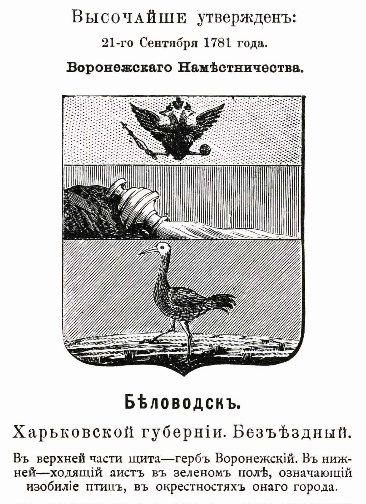 Official Russian Empire coat of arms Belovodsk. Герб безъ(у)ездного города Российской Империи Беловодск в 1899 Харьковской губернии (в 1781 - Воронежского наместничества) с официальным описанием в Гербовнике Винклера.